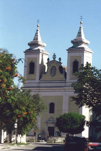 Pfarrkirche Winden am See